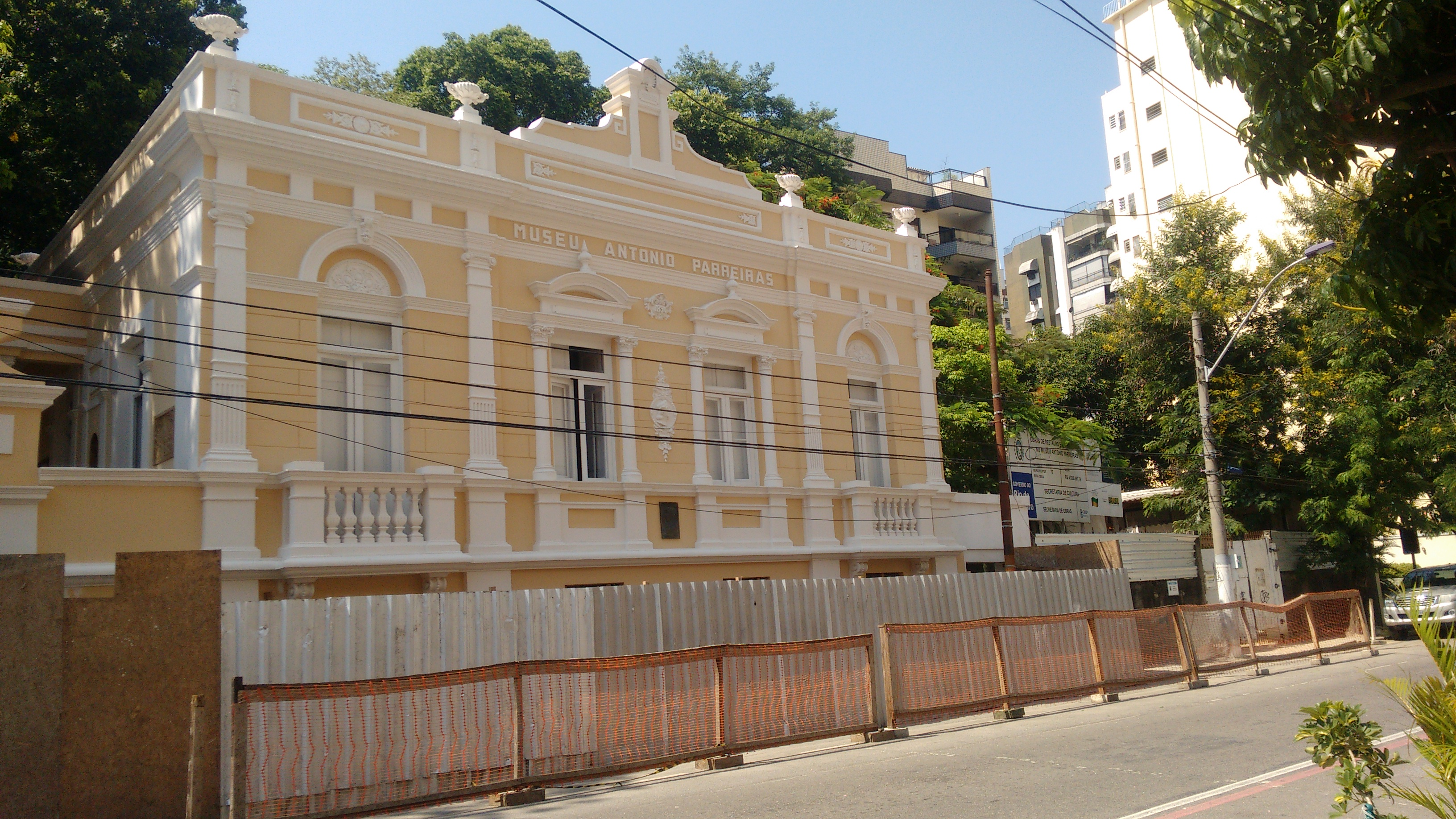 Edifício-sede do Museu Antônio Parreiras, à rua Tiradentes, nº 47, em Niterói, incluindo toda a área arborizada integrante da mesma propriedade, com as dimensões e confrontações constantes da planta que instruiu o processo